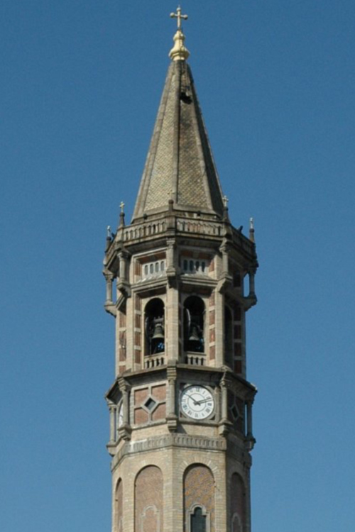 Il campanile della Basilica di Lecco